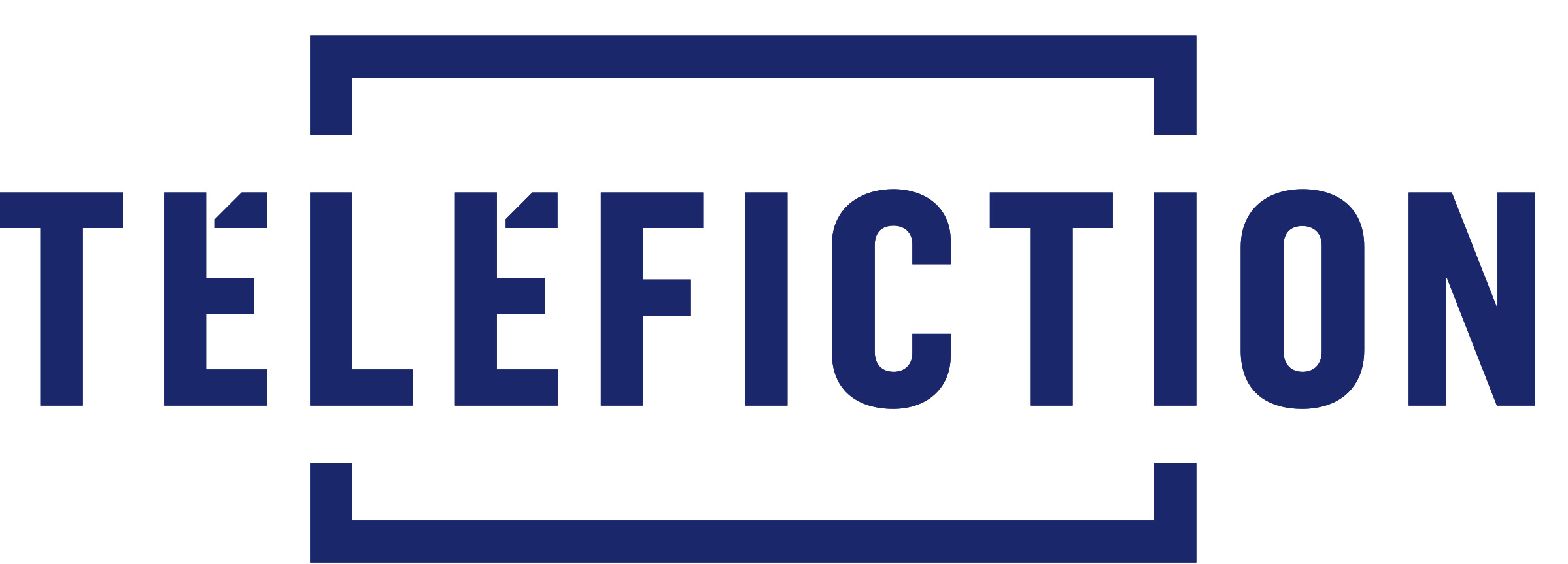 Téléfiction